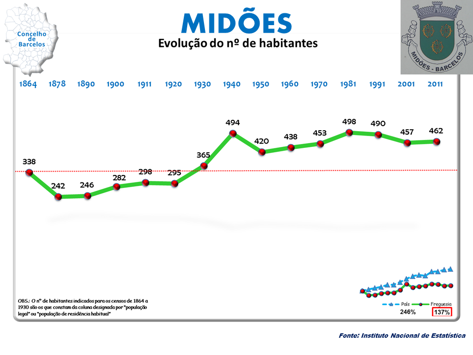 Cenos 1864/2011